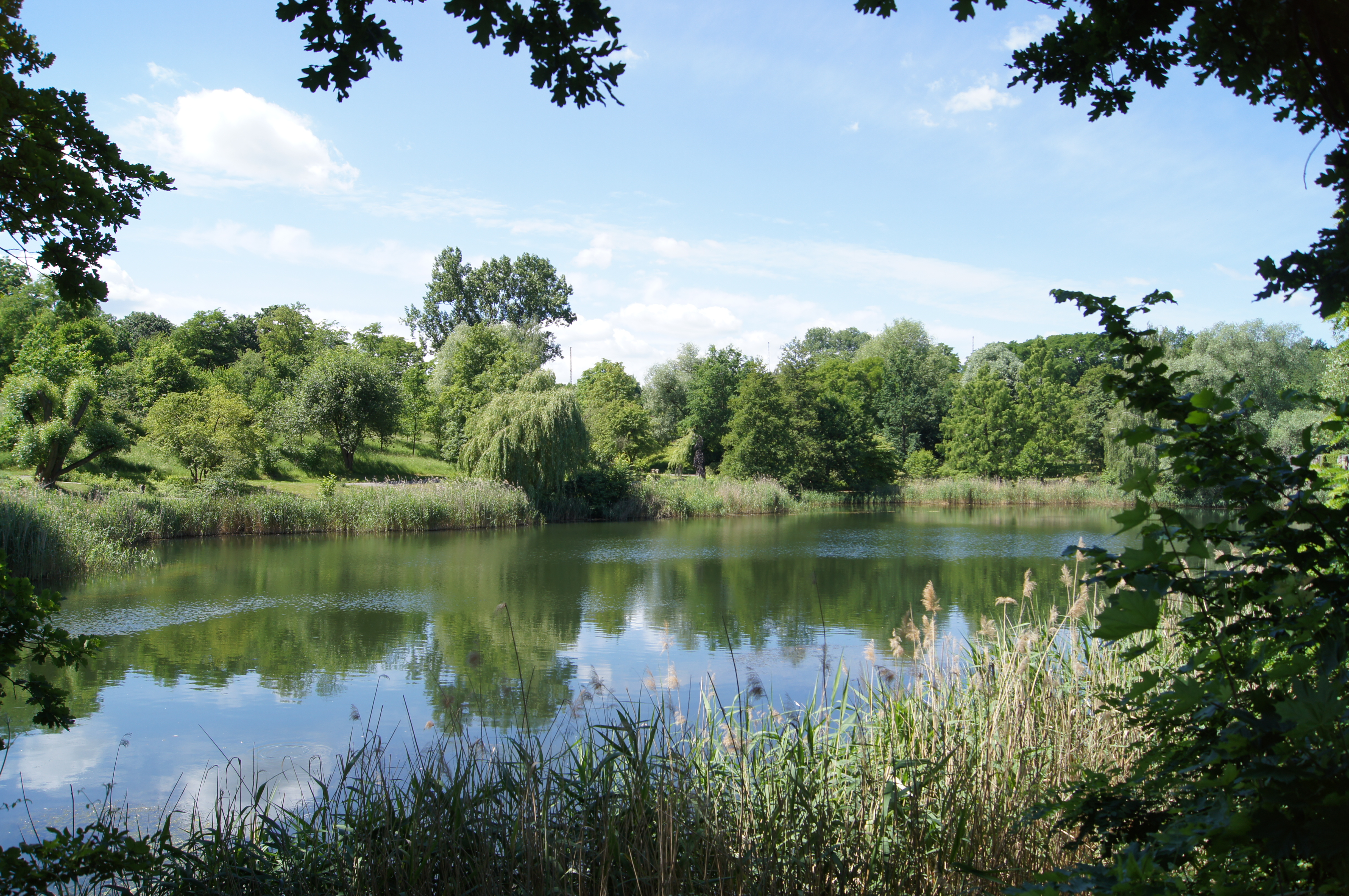 Botanischer Garten Frankfurt (Oder), Deutschland